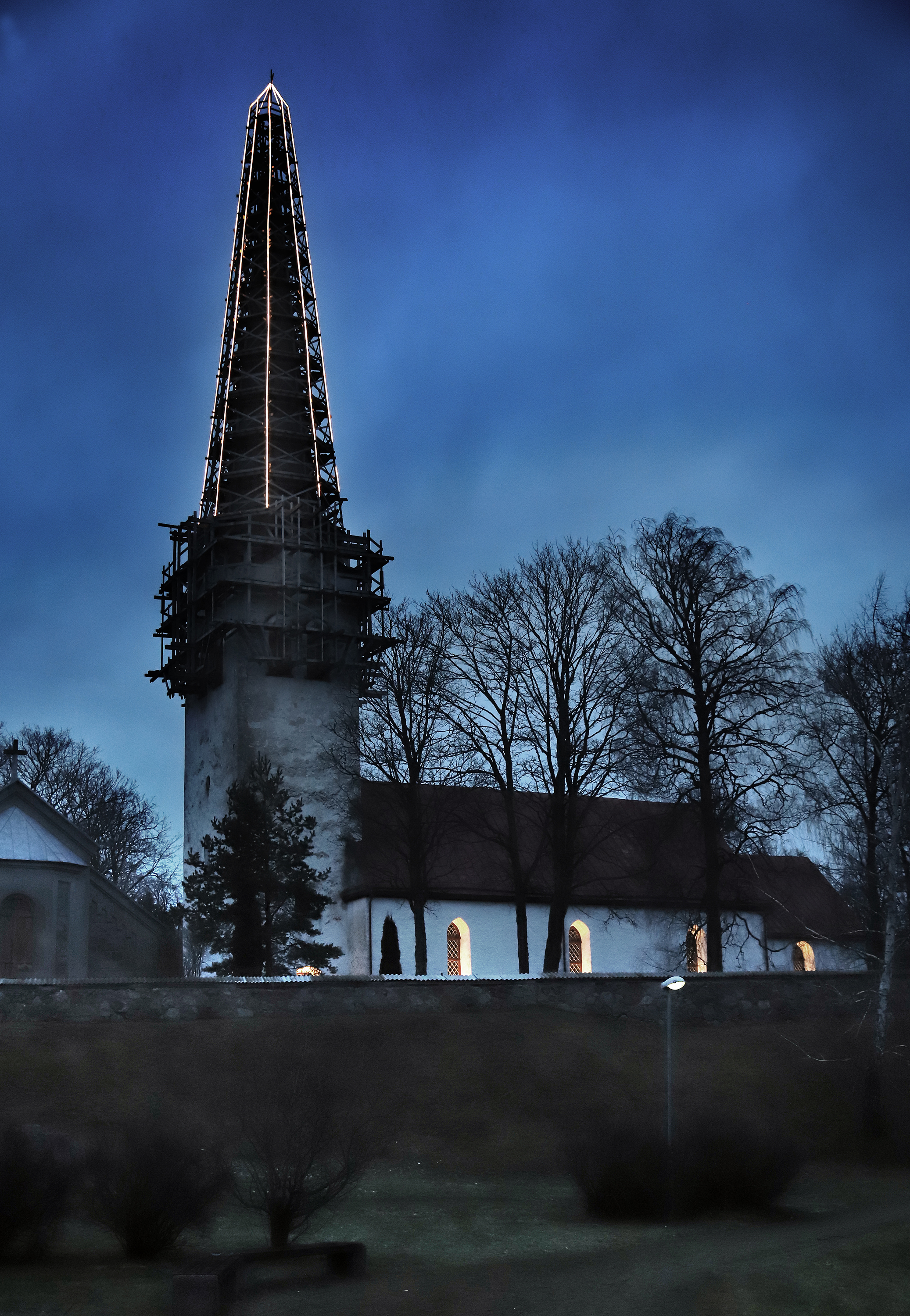 Kose kirik tellingutes 1.01.2020